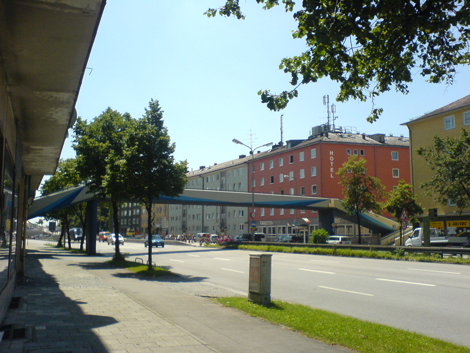 Fußgängerbrücke über die Tegernseer Landstraße, stadtauswärts gesehen